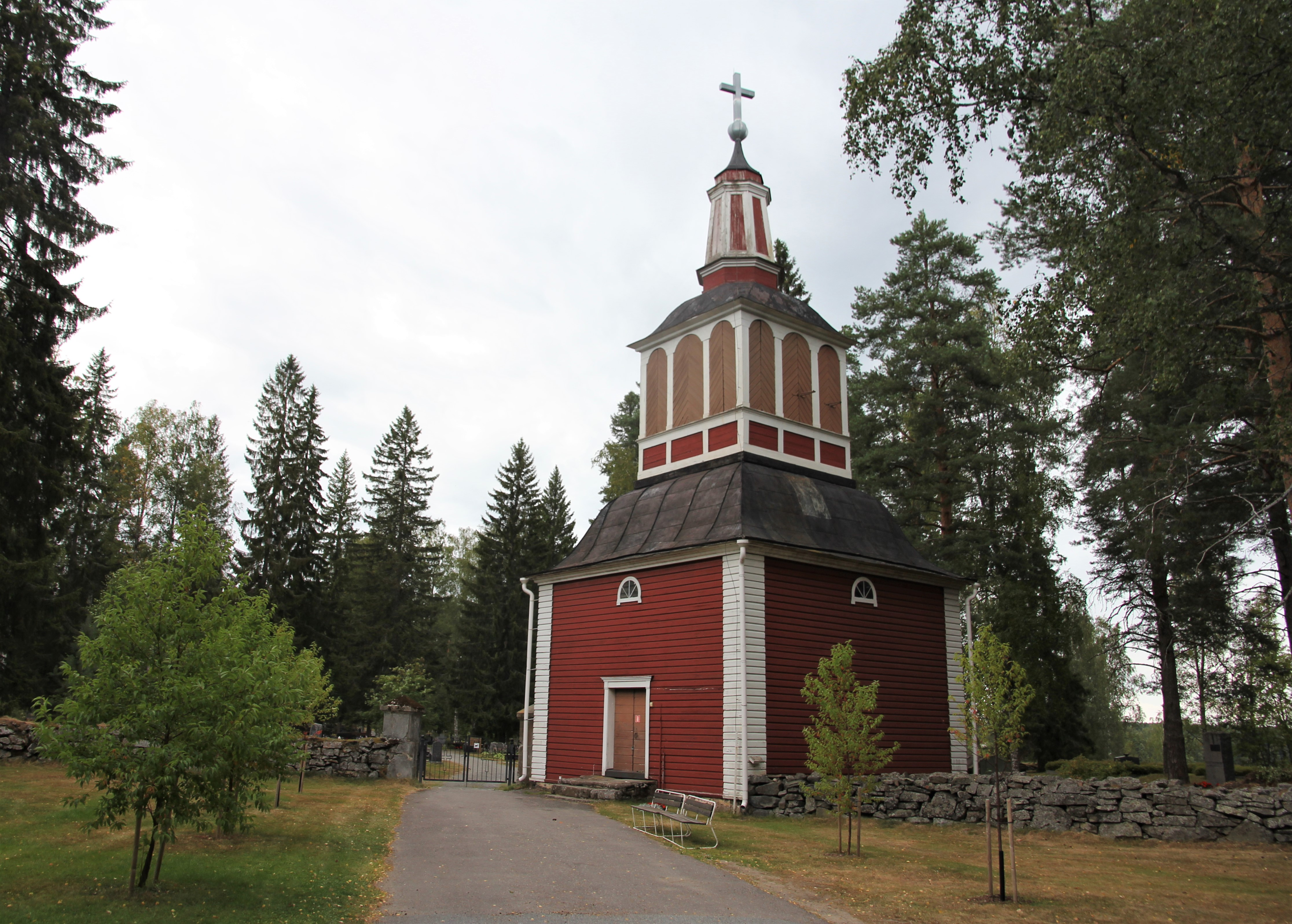 Rautalammin kirkon kellotapuli vuodelta 1768; se valmistui Rautalammin kolmannen kirkon yhteyteen. Rautalammin seurakunta mainitsee tapulin suunnittelijaksi Arvi Junkkarisen ( mutta Museoviraston Kulttuuriympäristön palveluikkunan sivulla ( tapulin suunnittelijaksi nimetään Eskil Collenius. Nykyisen eli Rautalammin neljännen kirkon valmistuttua kellotapuliin lisättiin 1875 ylimmän nivelen paikalle samanlainen tornin huippu kuin kirkossa on. Kellotapulin osoite on Kirkkotie 6, 77700 Rautalampi. Kuvan oikeassa alalaidassa erottuu kiviaidan takaa hautausmaalla sijaitseva Rautalammin toisen ja kolmannen kirkon paikkaa osoittava muistomerkki.